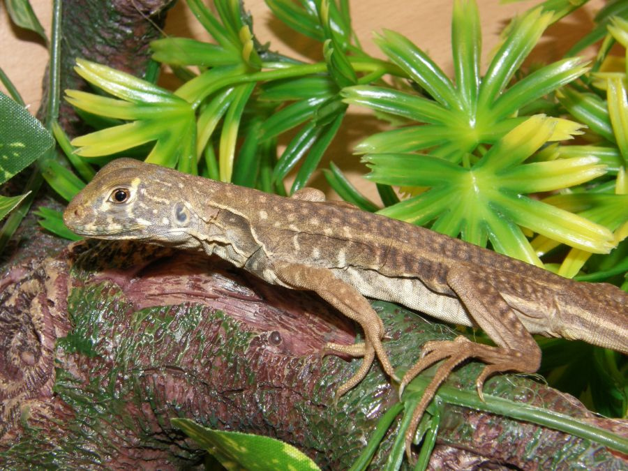 Leiolepis sp.